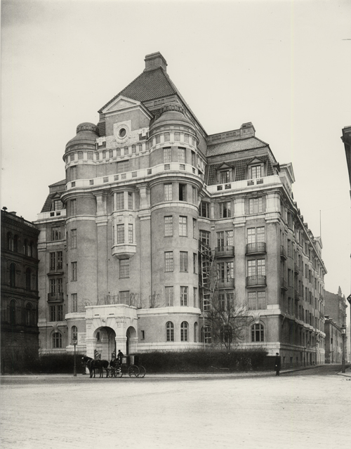 SAF-huset, Blasieholmen